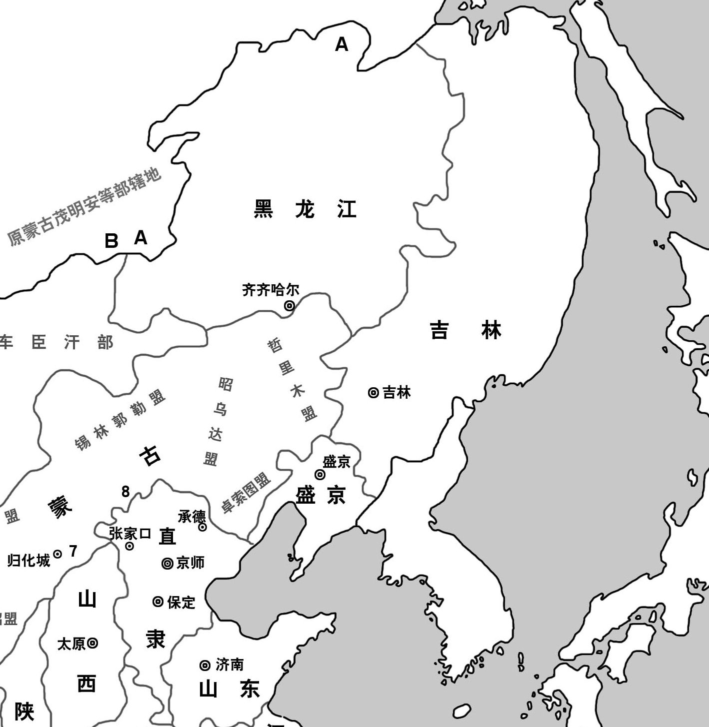 Bản đồ vùng Đông Bắc nhà Thanh năm 1820